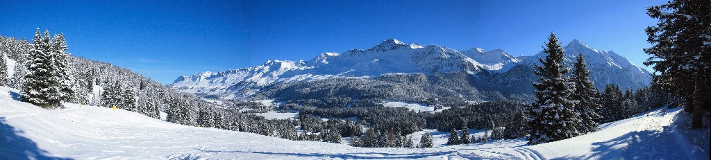 Lenzerheide, Schweiz, Panorama